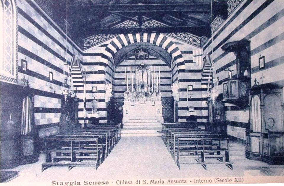 Chiesa di S. Maria Assunta a Staggia Senese, aspetto dell'interno con le decorazioni neomedioevali eseguite nel 1904, asportate assieme agli antichi arredi nel 1952.